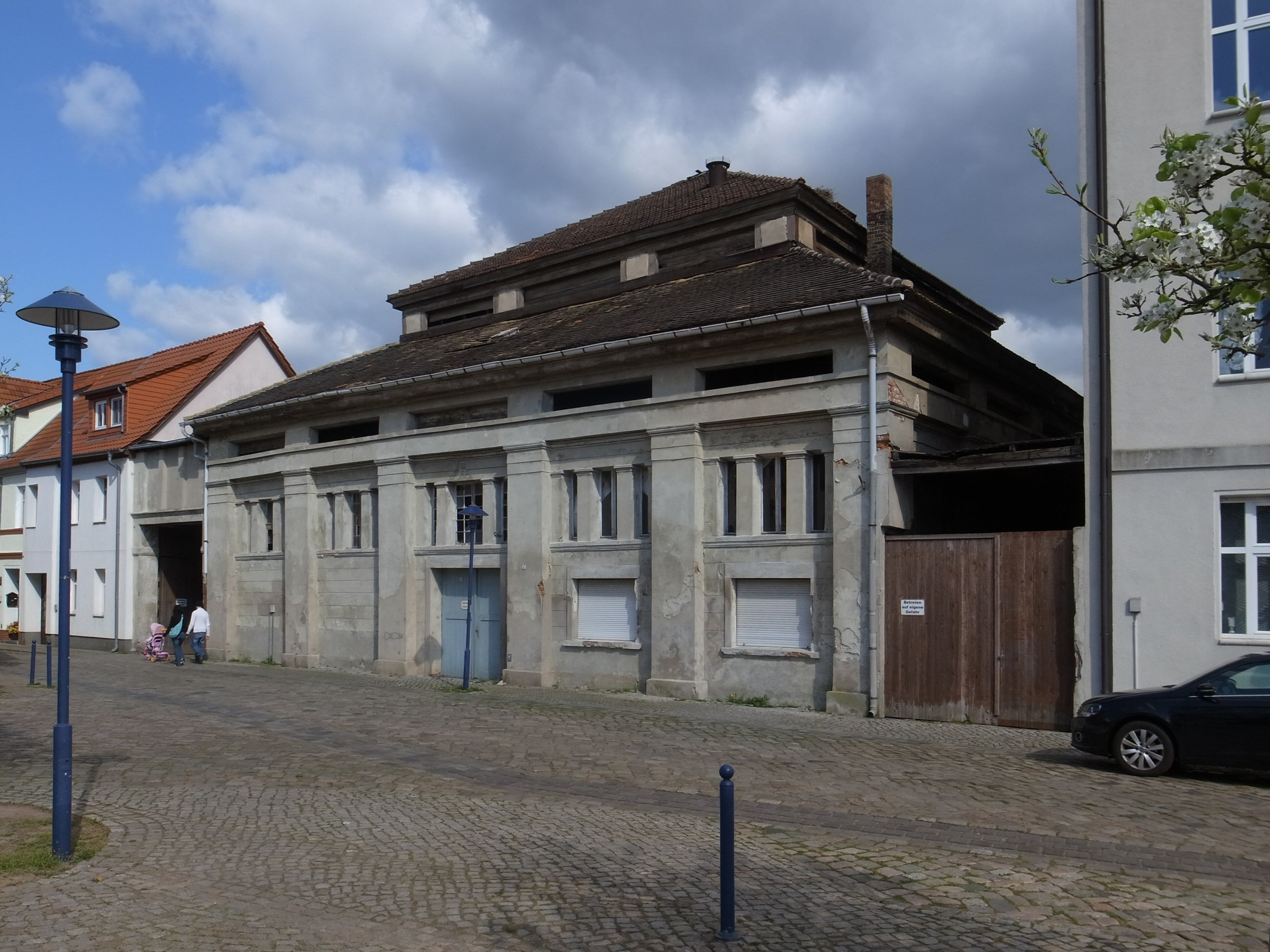 Dessau-Roßlau, Kleine Marktstraße 6, Brauhaus, 1826 erbaut von Gottfried Bandhauer (Baudenkmal im Denkmalverzeichniss Sachsen-Anhalt, Erfassungsnummer: 094 35853 000 000 000 000 [1])